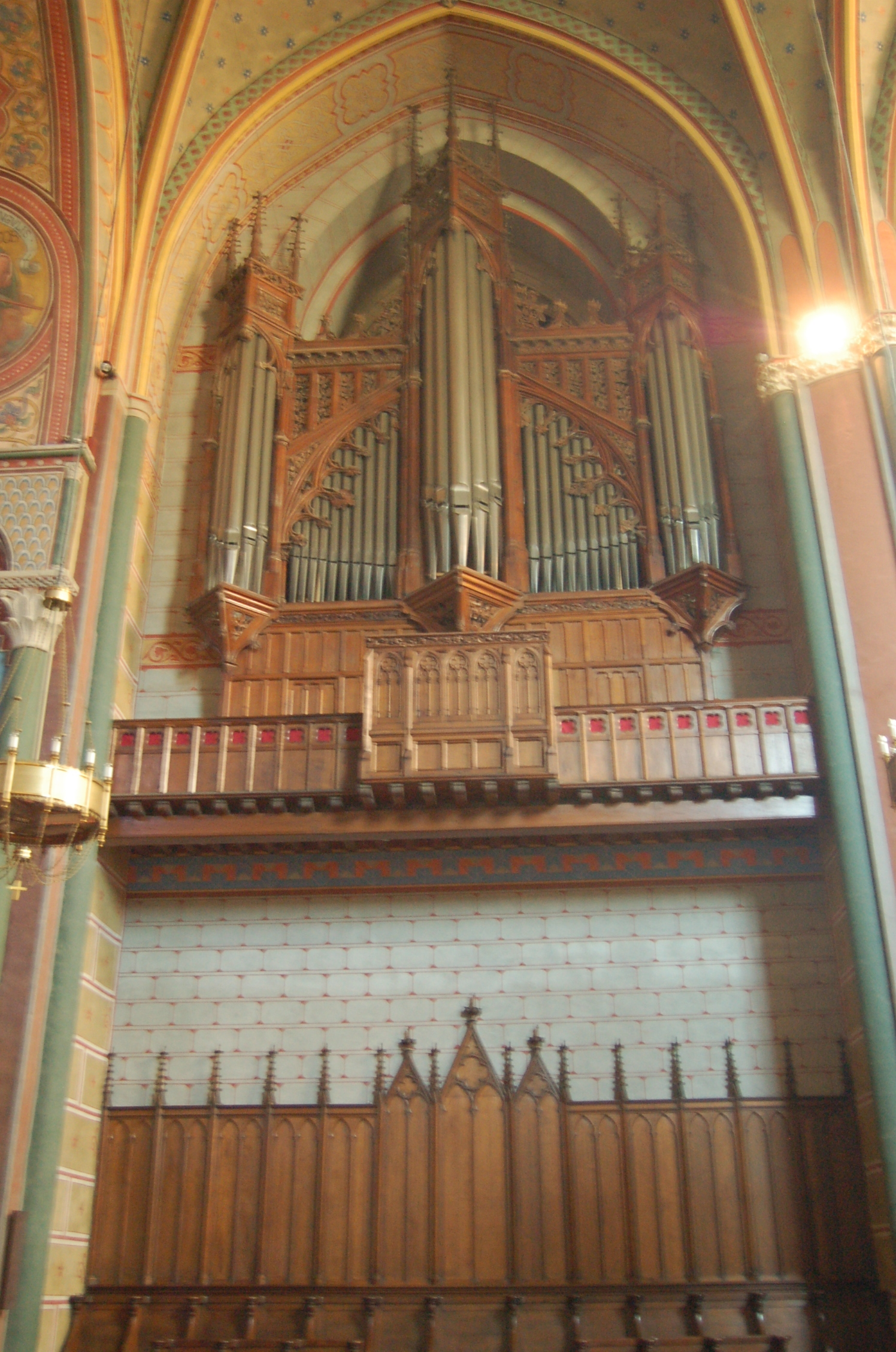 Orgue principal de la cathédrale Saint Caprais d'Agen, construit en 1855 par Jean-Baptiste Stoltz & Schaff pour l’Exposition Universelle de Paris, transféré à Agen par Abbey & Boulet, restauré en 2004 par la Manufacture Languedocienne de Grandes Orgues & Claude Berger.